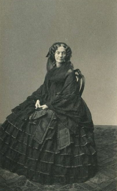 Тучкова Елизавета Ивановна (1805—1875), урожденная Веригина